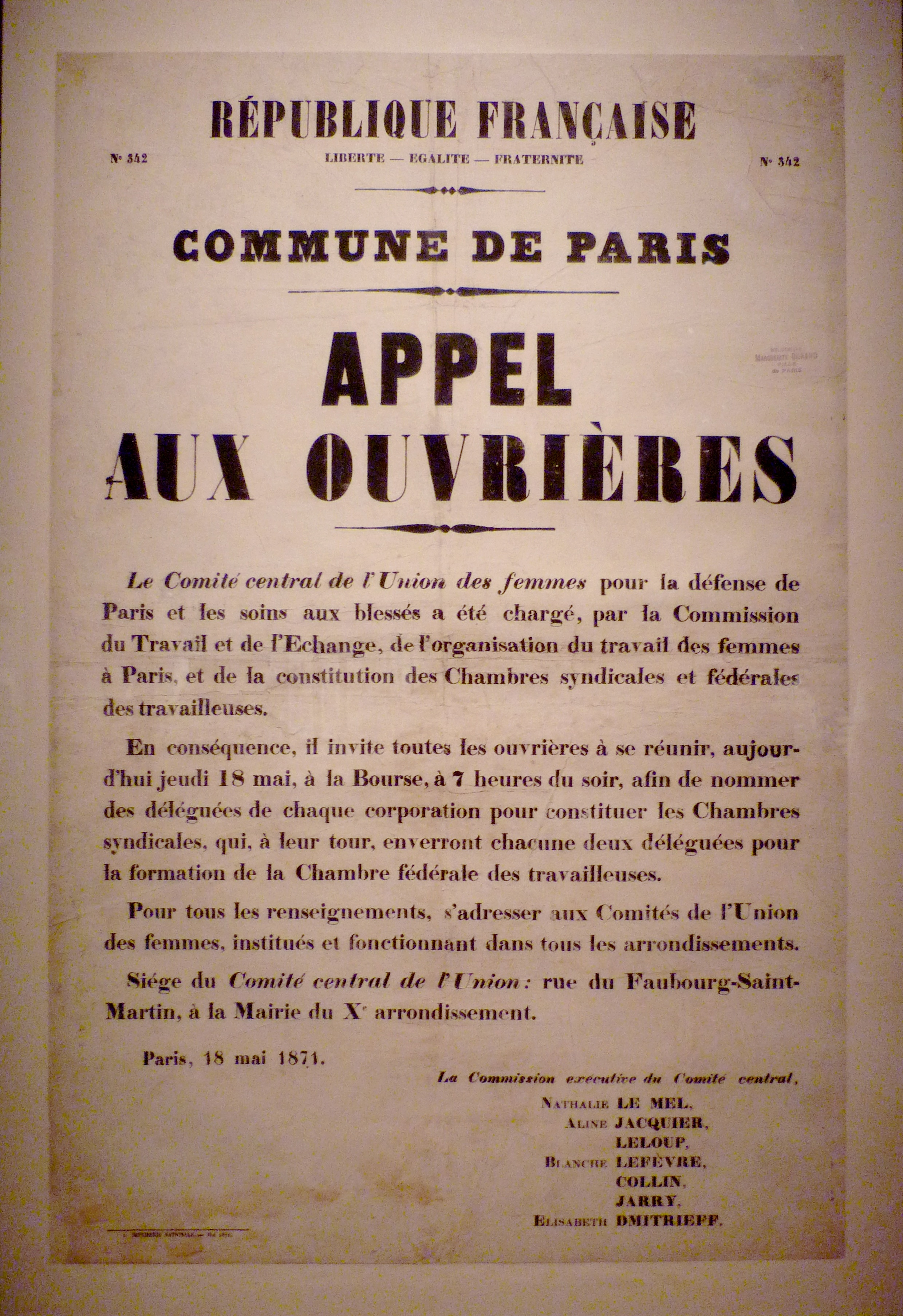 Exposition La Commune de Paris à l'Hôtel de Ville de Paris (18 mars - 28 mai 2011) - Affiche de l'appel aux ouvrières, le 18 mai 1871 (noter la signature d'Elisabeth Dmitrieff, révolutionnaire russe envoyée par Karl Marx pour suivre les évènements de la Commune). Bibliothèque Marguerite Durand.